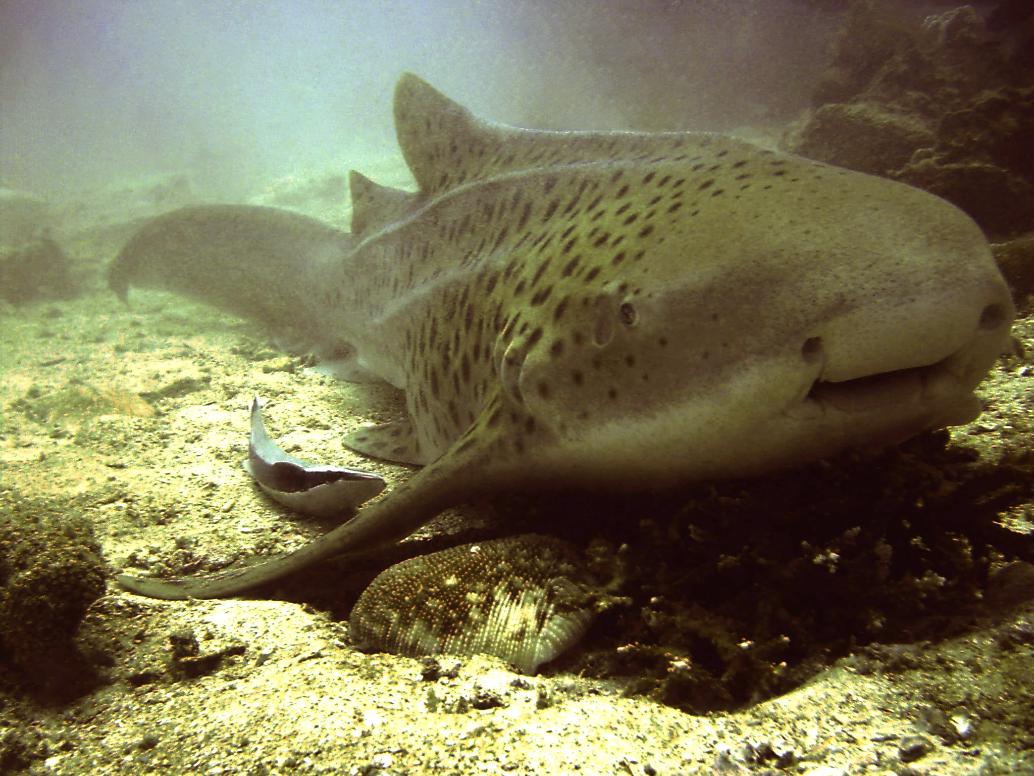 Leopardenhai (Stegostoma fasciatum) in 25 m Tiefe, Similan Inseln, Thailand. – Der nur in bestimmten Regionen vorkommende Leopardenhai wird auch Zebrahai genannt, da er zur Tarnung in der Jugend Streifen besitzt, die erst im Erwachsenenstadium zu den bezeichnenden Leopardenflecken werden. – Diese bis zu ca. 1,8m lange Art ist friedfertig und neugierig. Die nachtaktiven Tiere halten am Tag gerne ein Schläfchen auf sandigem Boden.